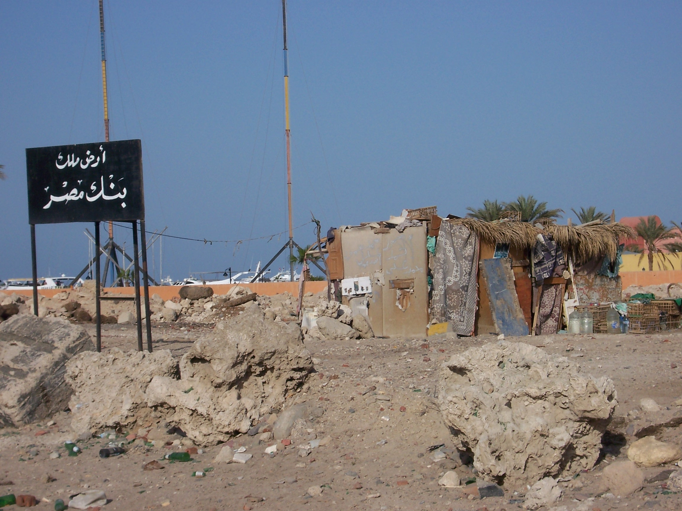 Aufnahme einer "Unterkunft" in einer ägyptischen Stadt.